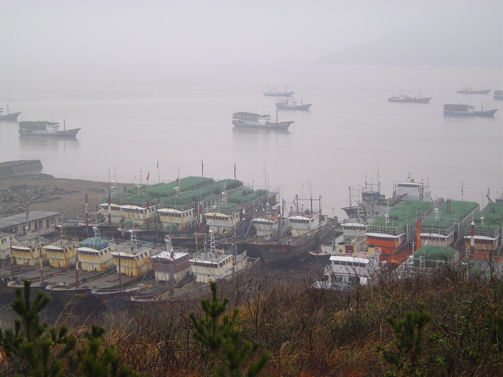 中文（中国大陆）: 南峰渔港